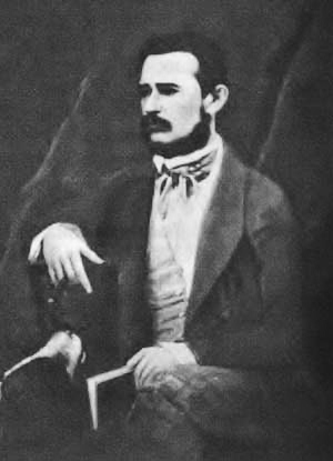 Майков, Валериан Николаевич